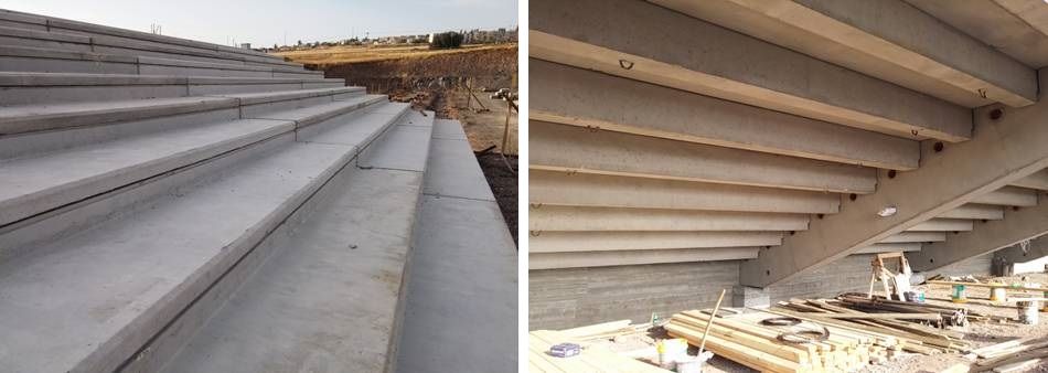 Bodek Architects Tiberias Football Stadium